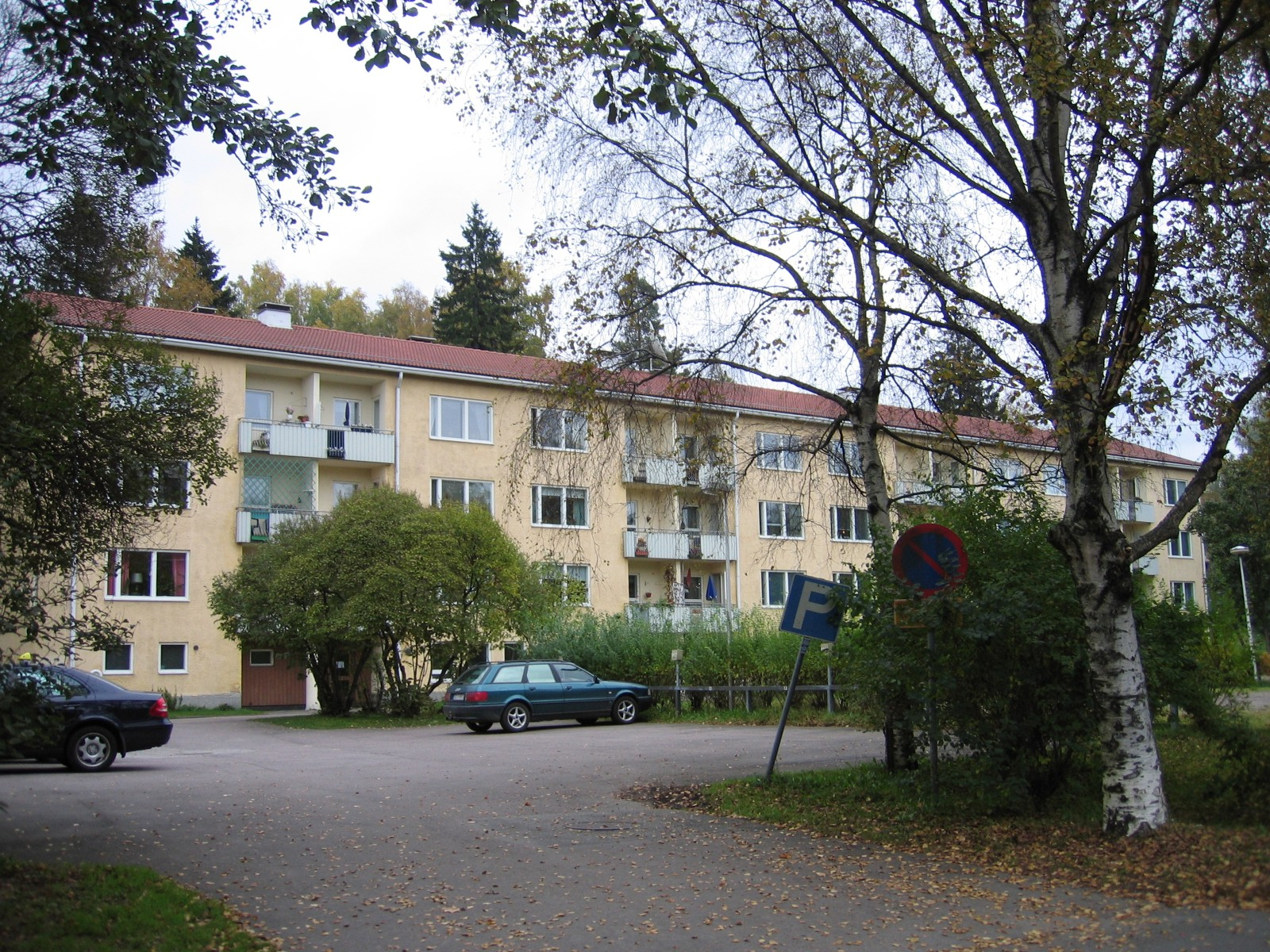 Maunula/Månsas in Helsinki, Finland